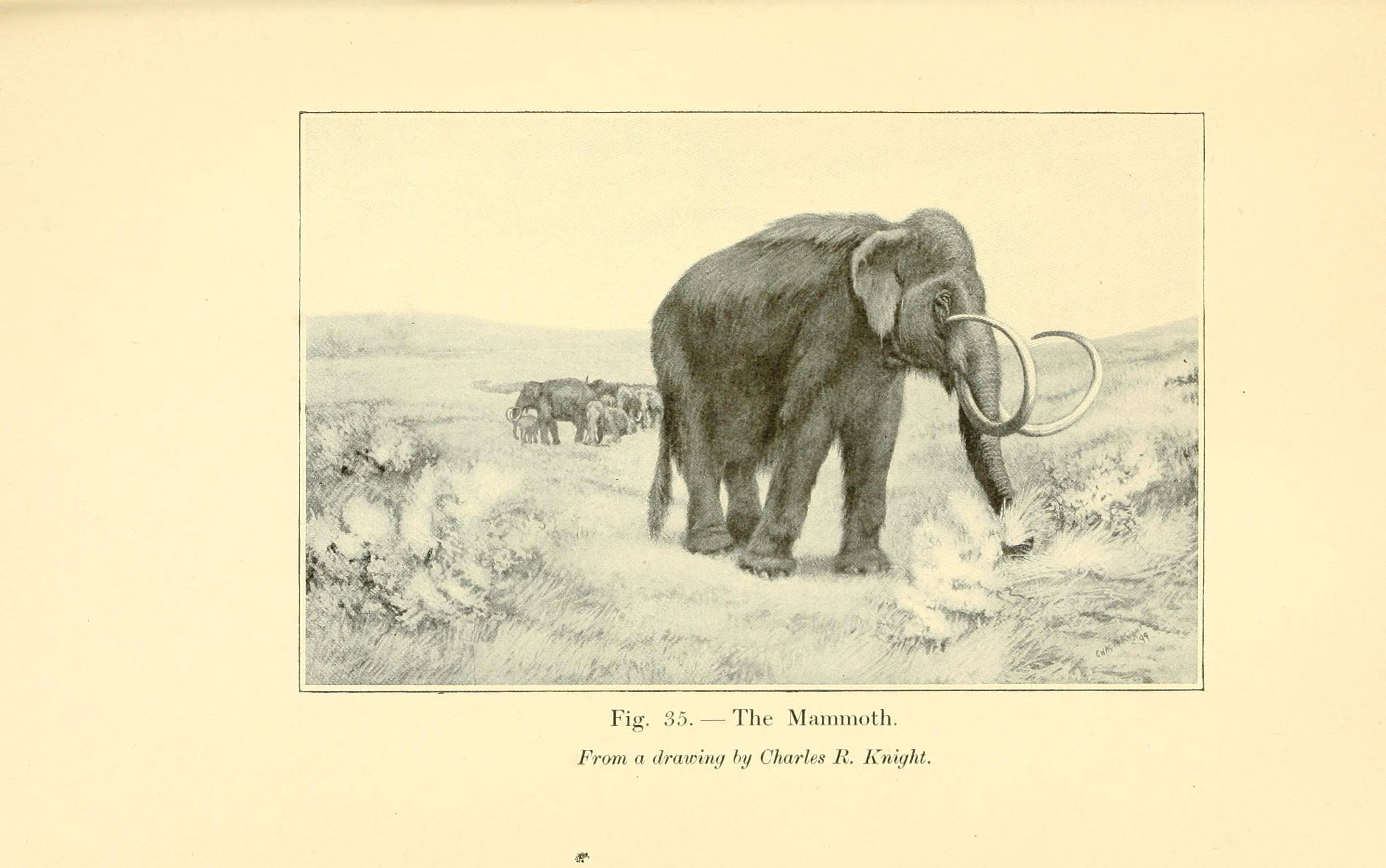 m o o p -^ be